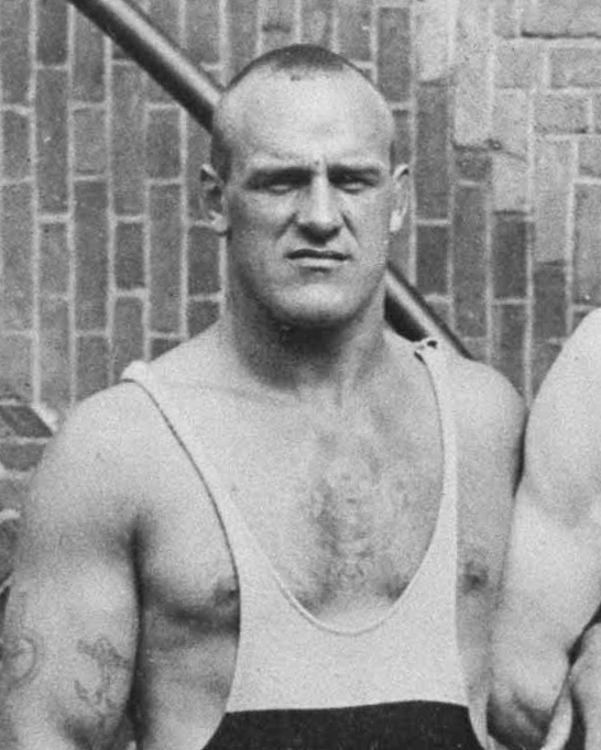 Rudolf Svensson (1899–1978)